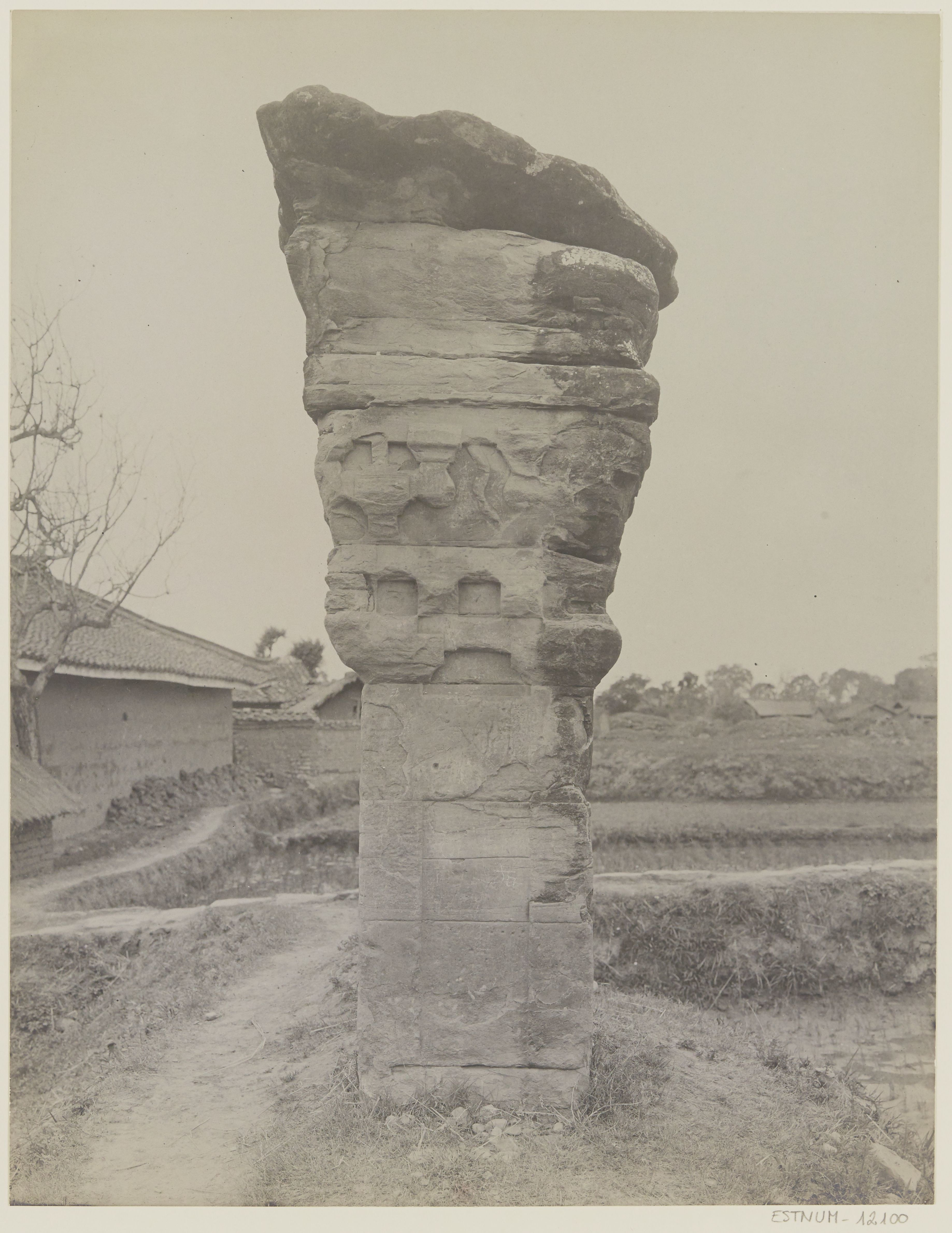 中文（台灣）: 梓潼漢代四闕